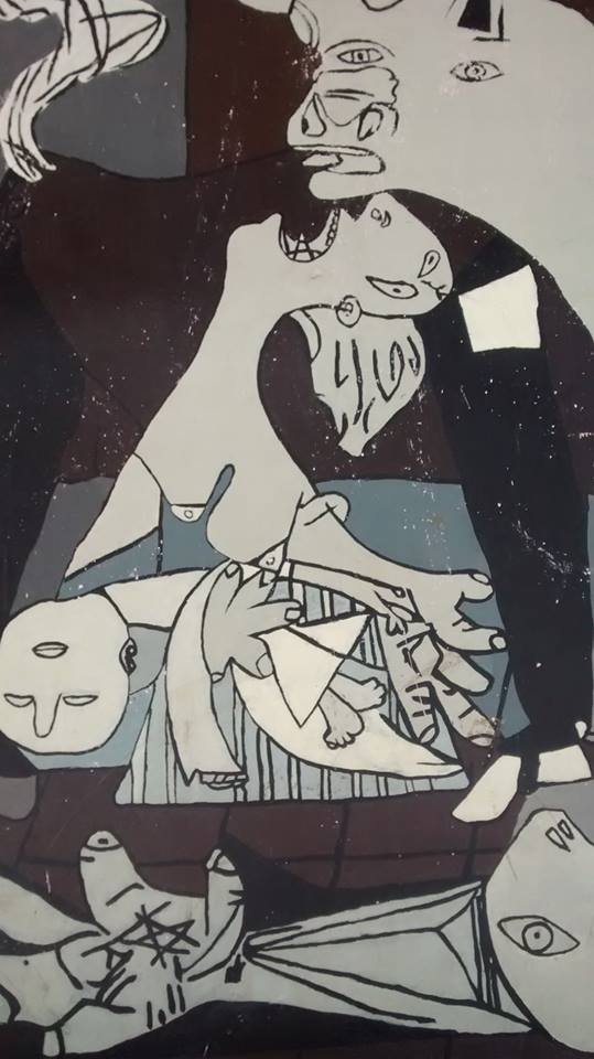 Pinturas de muralismo urbano público, en calle Carmen Covarrubias esquina Irarrázabal, en la comuna de Ñuñoa, Santiago de Chile.